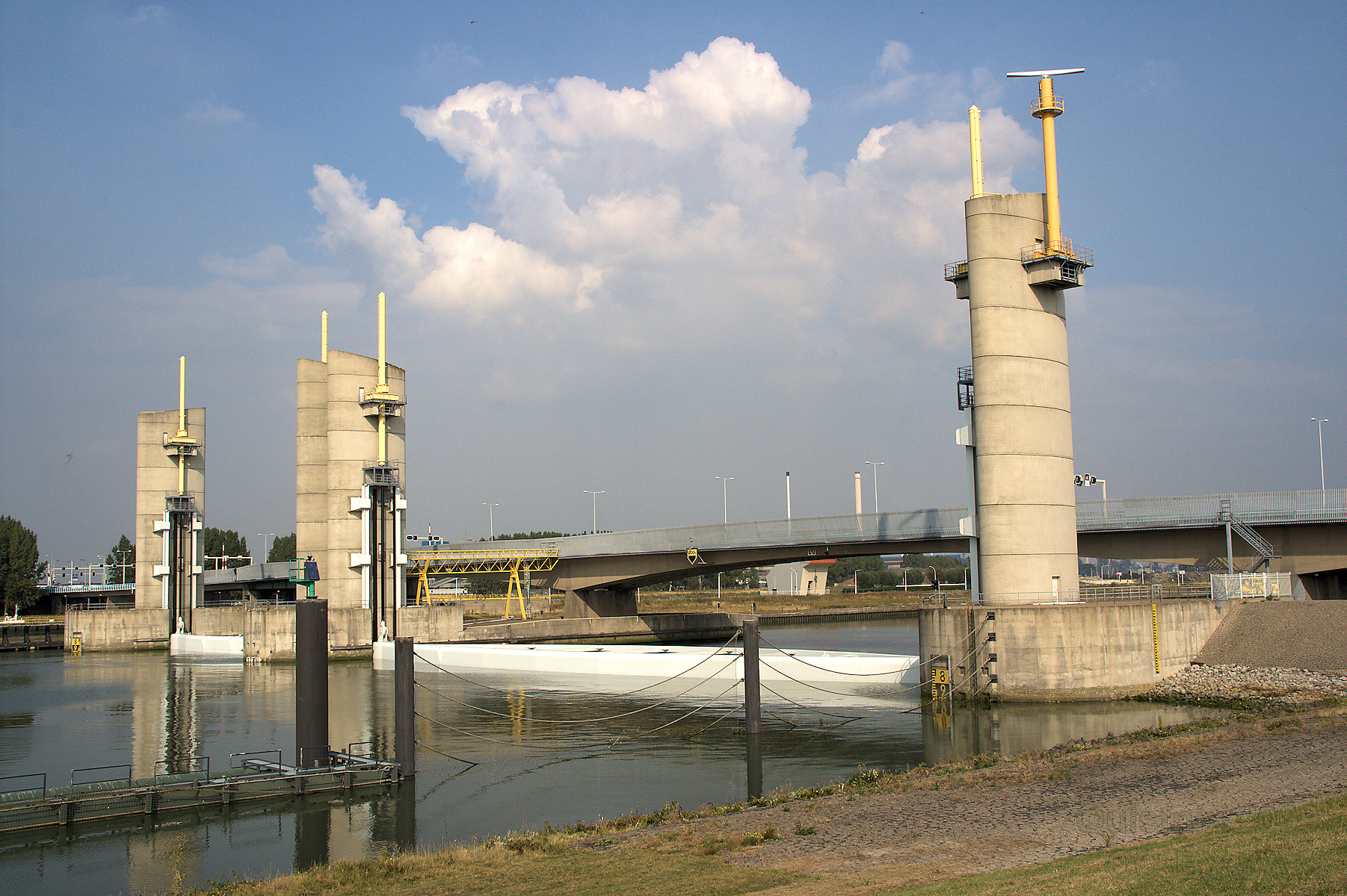 Spijkenisse: Hartelkering, gesloten